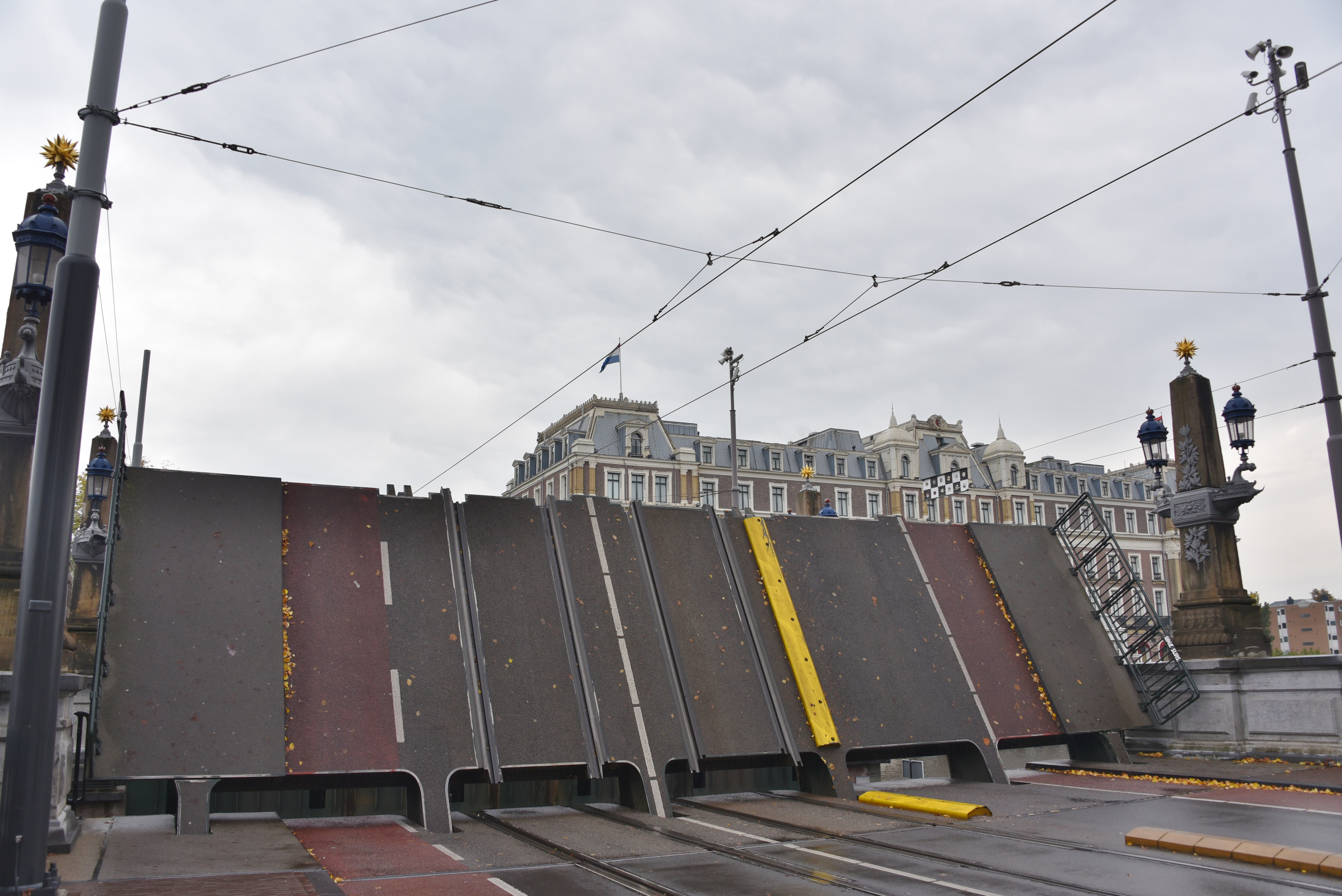 Hogeslius Bridge in Amsterdam open